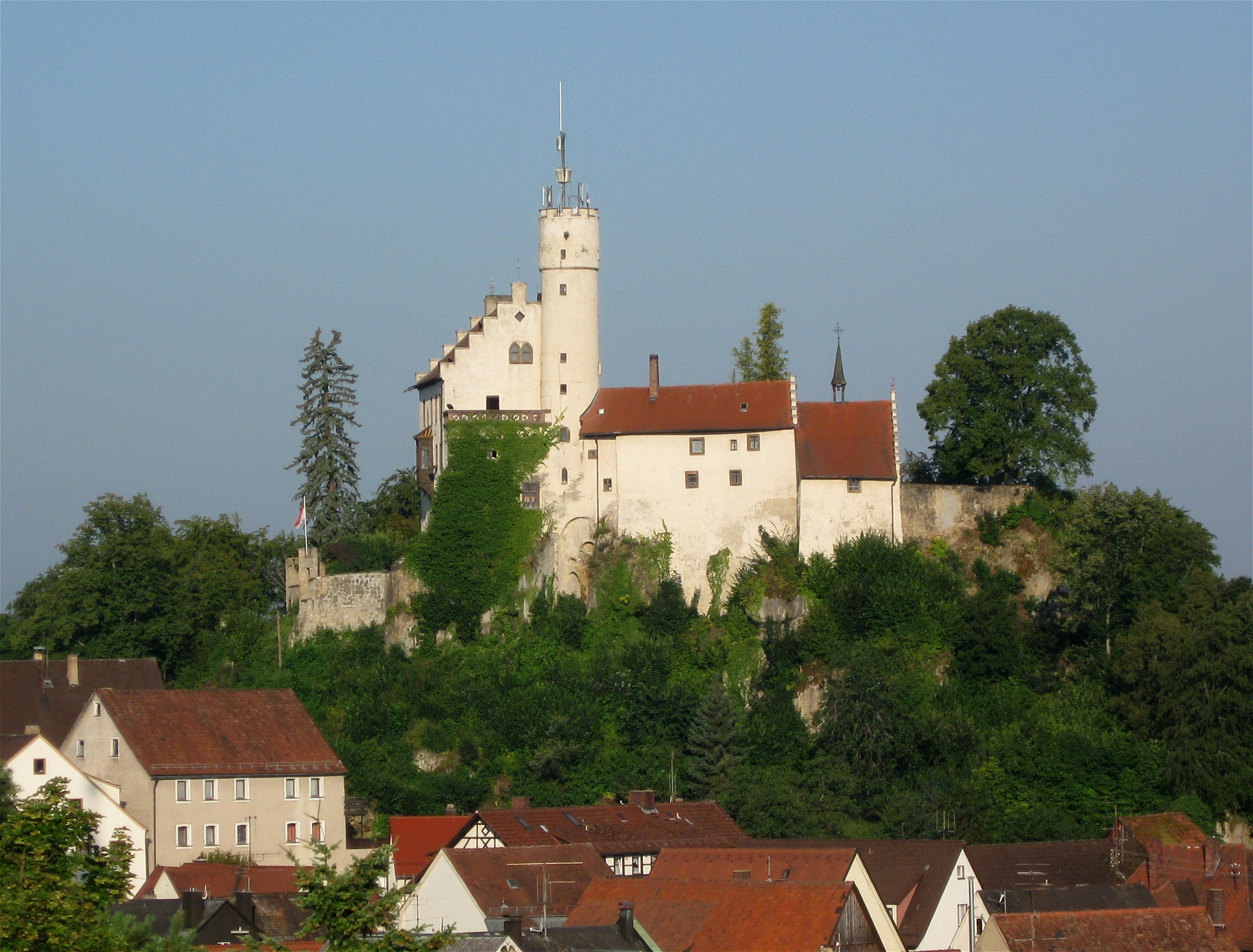 Burg Gößweinstein